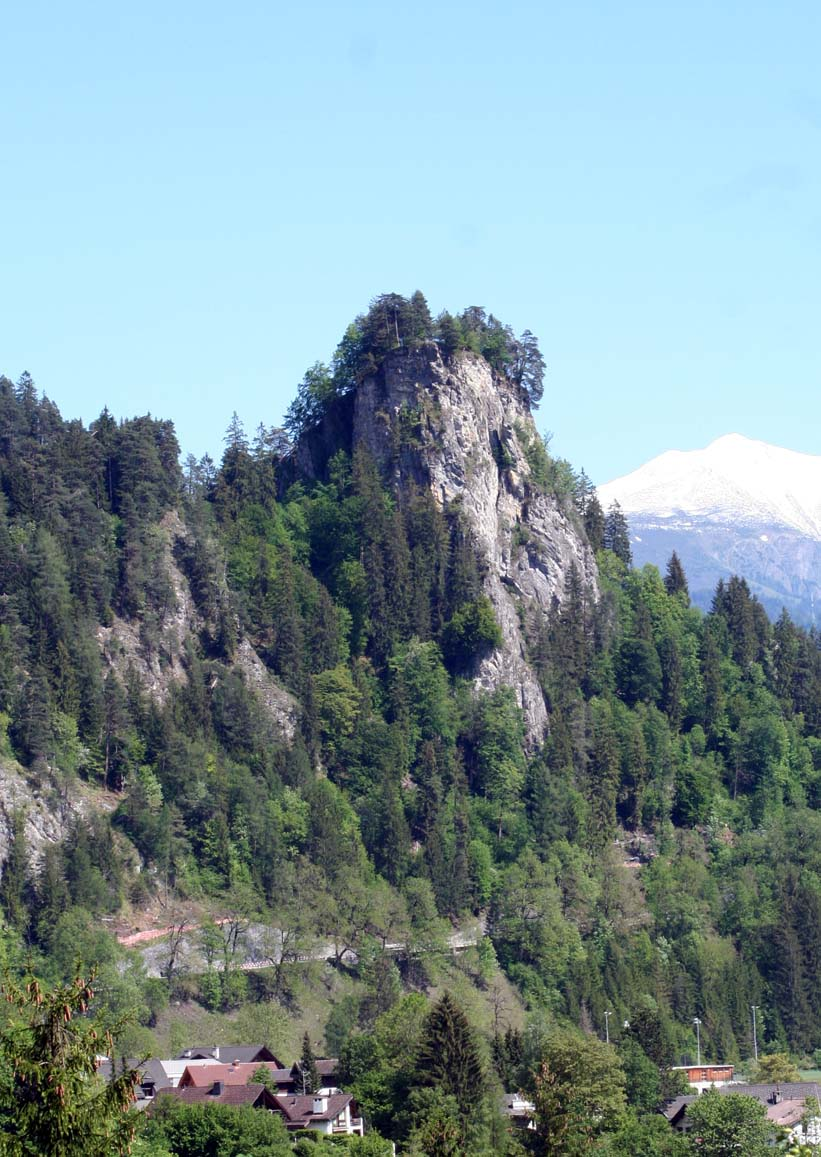 Fels von Sogn Parcazi, Richtung Osten